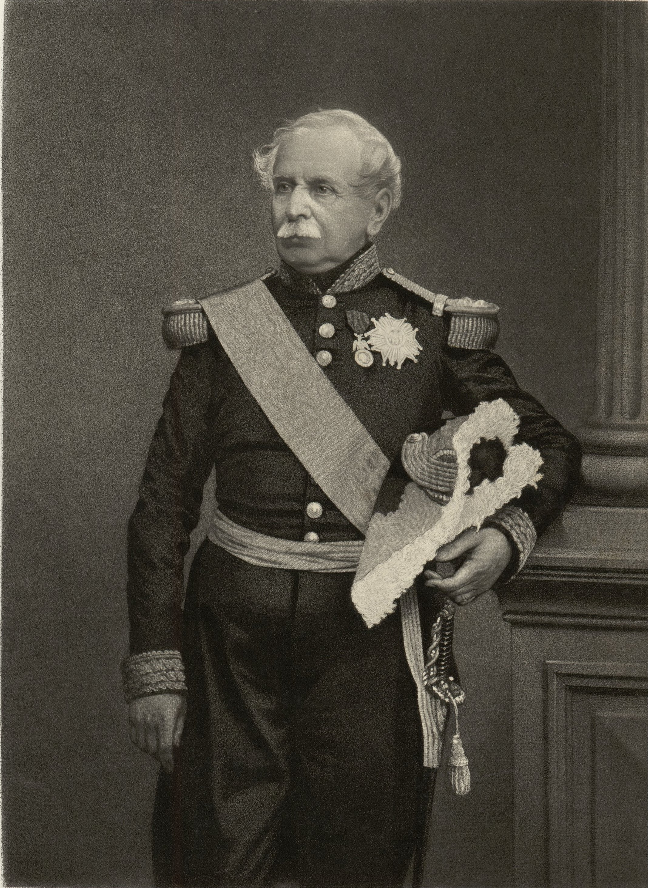 The General and "Maréchal de France" Jacques Louis Randon (1795-1871)